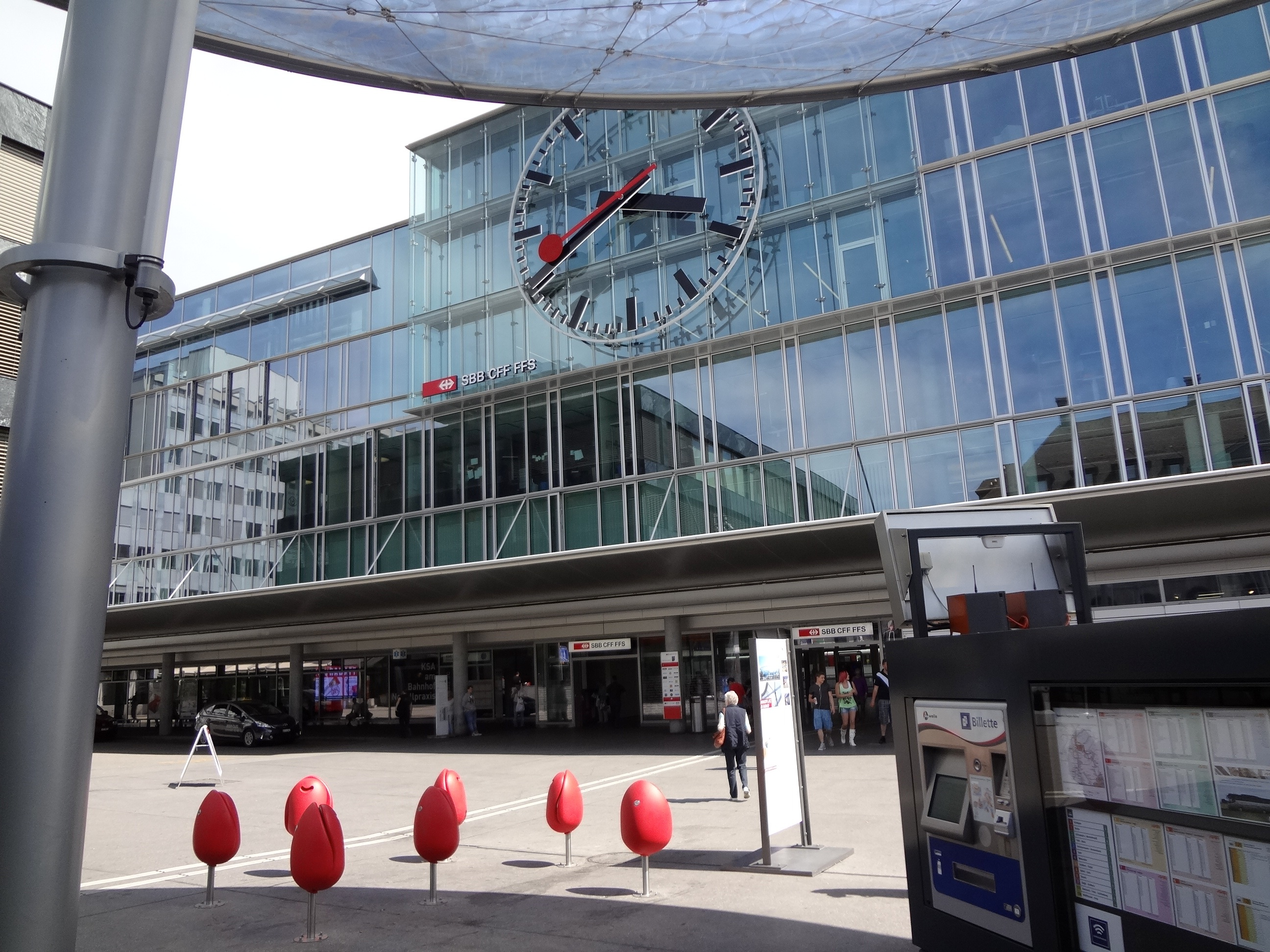 Bahnhof's Platz Aarau